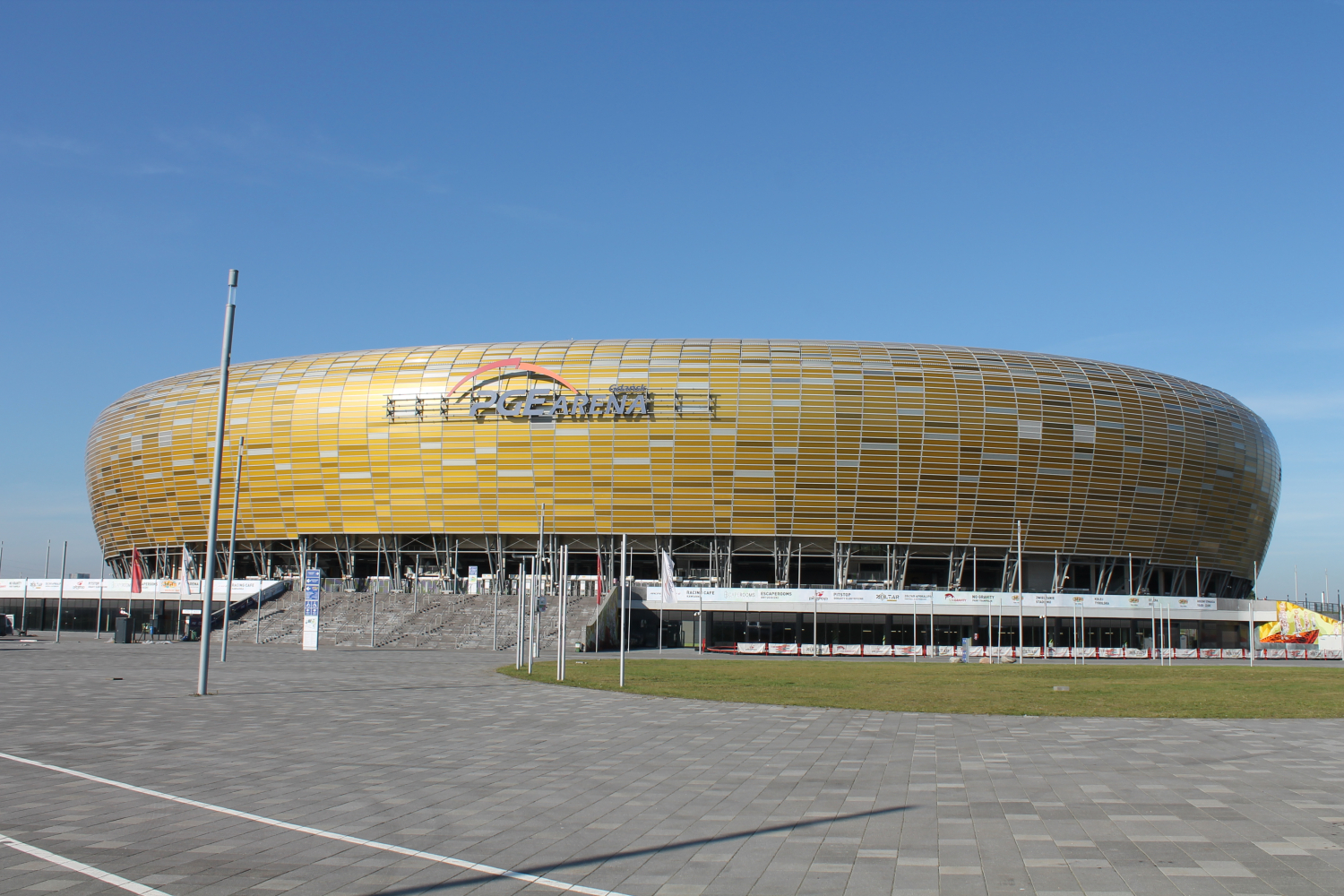 Stadion PGE Arena w Gdańsku. The making of this document was supported by Wikimedia Polska Association, within Wikigrant no. WG 2015-34.